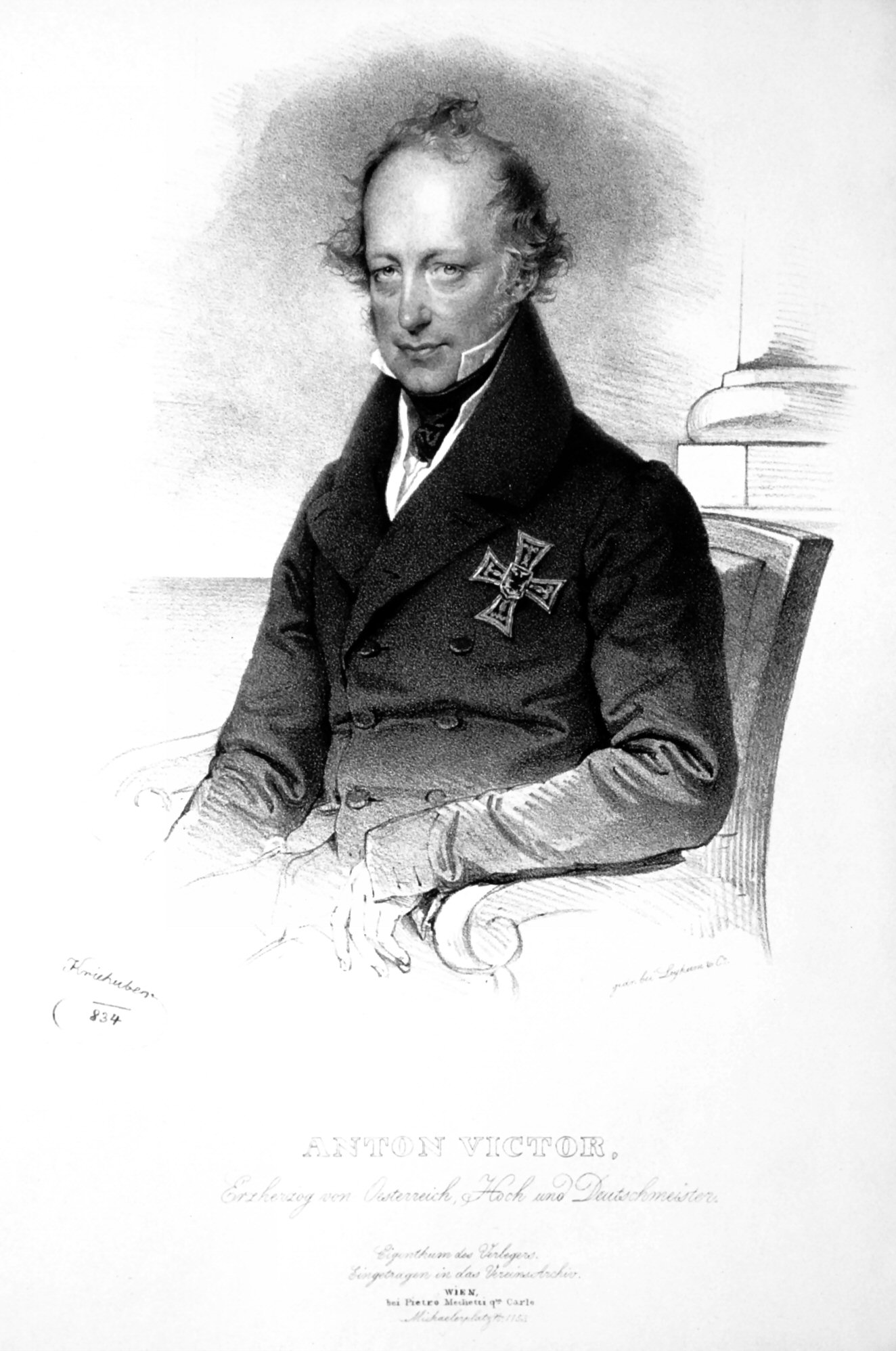 Erzherzog Anton Viktor von Österreich (1779-1835), Hochmeister des Deutschen Ordens, Vizekönig von Lombardo-Venetien.